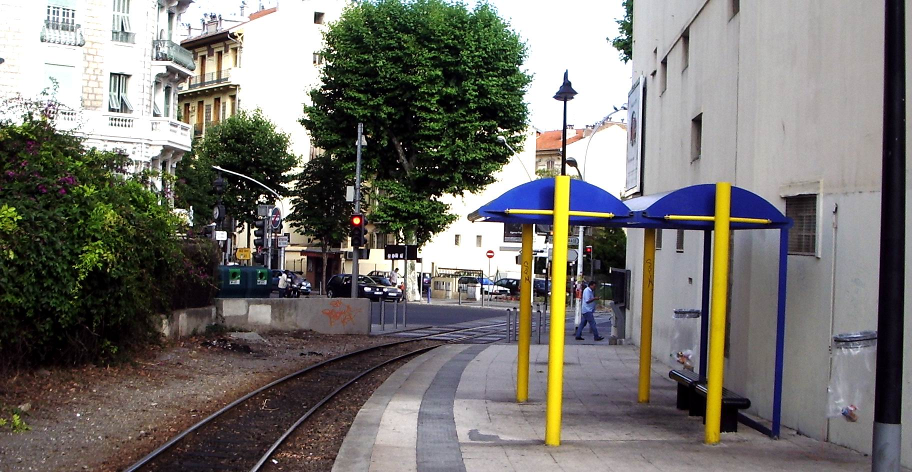 Jadis appelé quartier du "passage à niveau" en raison de la barrière qui protégeait la voie ferrée des Chemins de fer de Provence. Aujourd'hui le carrefour du 28 août est célébre pour son insurrection populaire en 1944 contre l’occupation étrangère.